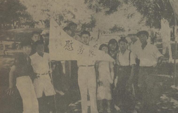 题名： 民衆踴躍慰勞：中華民族解放先鋒隊代表赴醫院勞軍：[照片] 文献来源： 《芦沟桥事件画刊》 出版时间： 1937 年 卷期(页)： [ 八月 ，22页 ] 中图分类号： K265.4